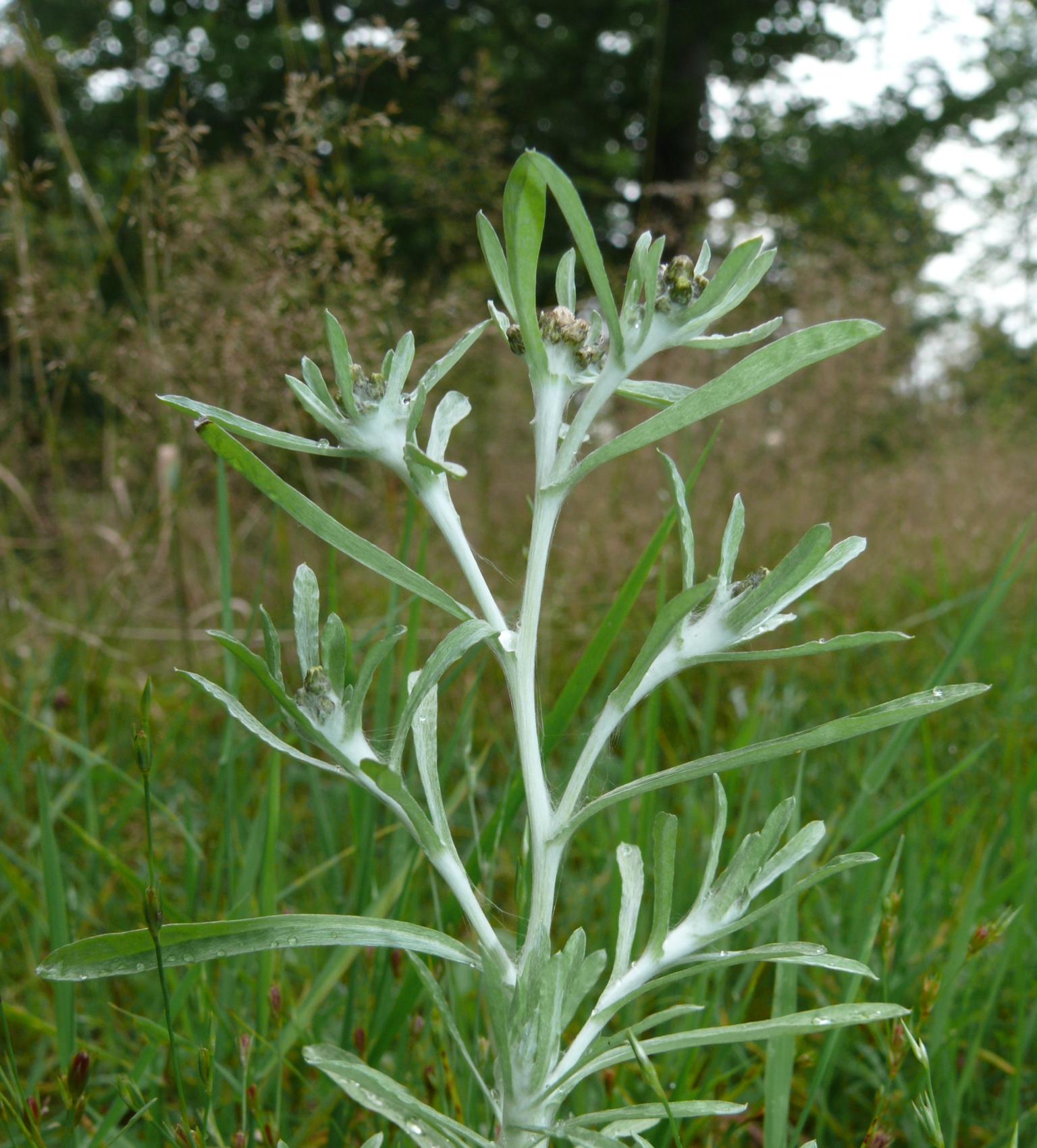 Gnaphalium uliginosum, Schwäbisch-Fränkische Waldberge, Germany